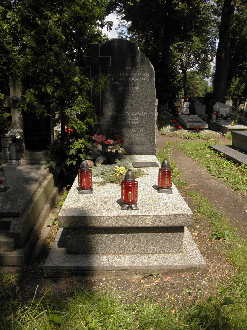 Grób profesora Alfreda Jahna na cmentarzu św. Wawryńca